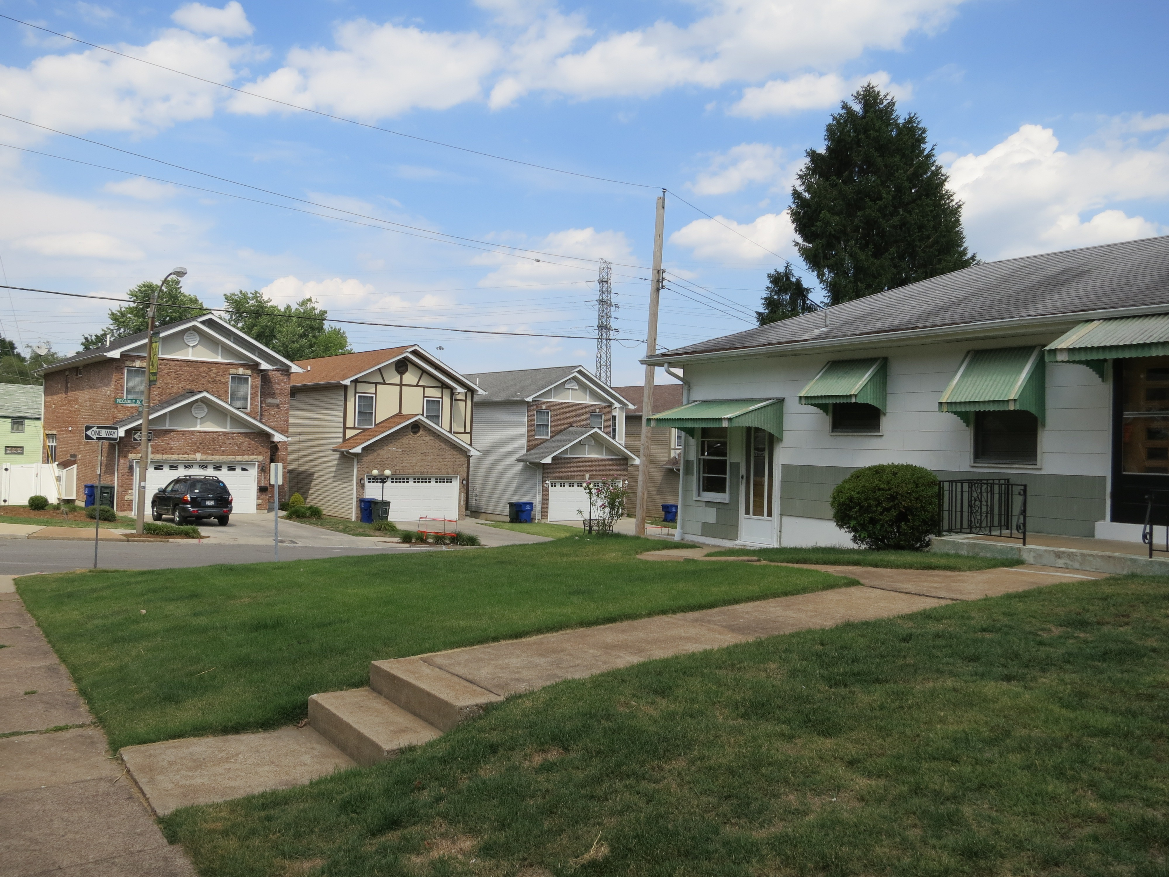 Ellendale Intersection